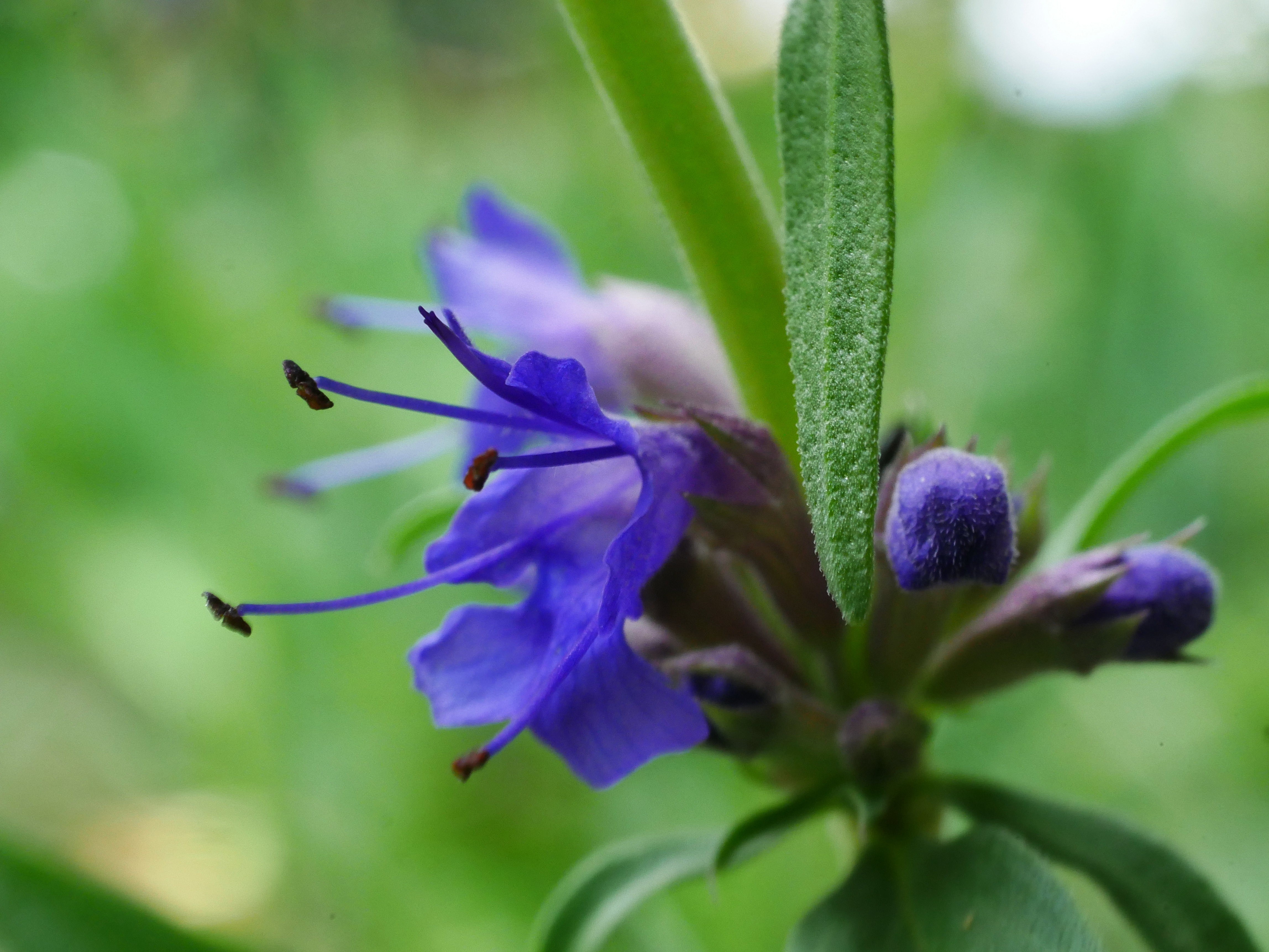 Ysop (Hyssopus officinalis) im Freilichtmuseum Roscheider Hof. Standort: Kräutergarten